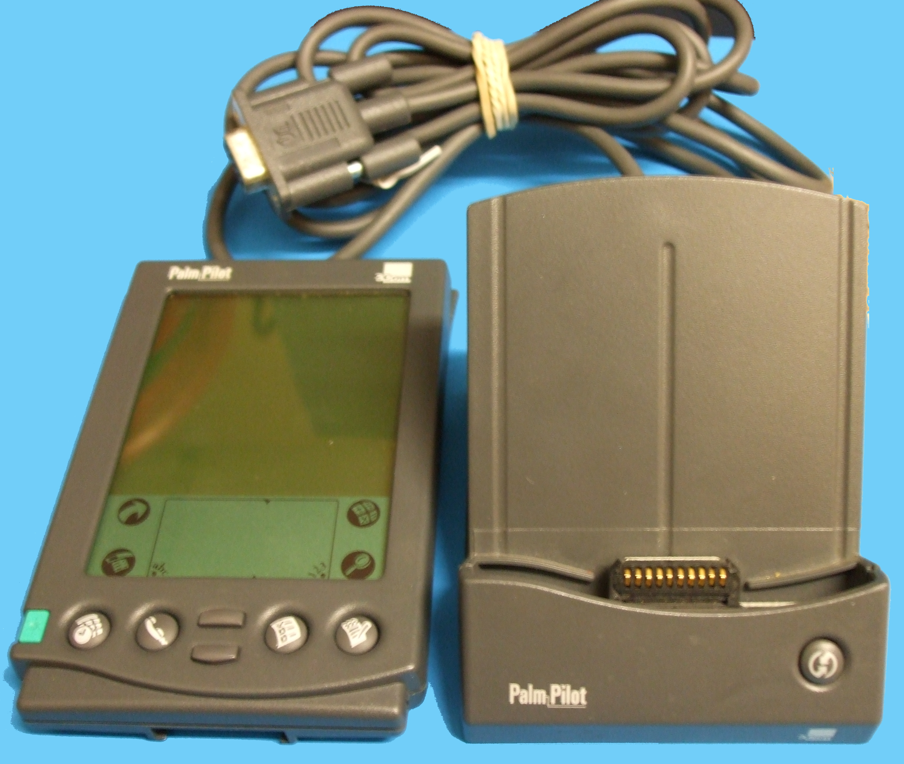 PalmPilot Professional con cuna serial